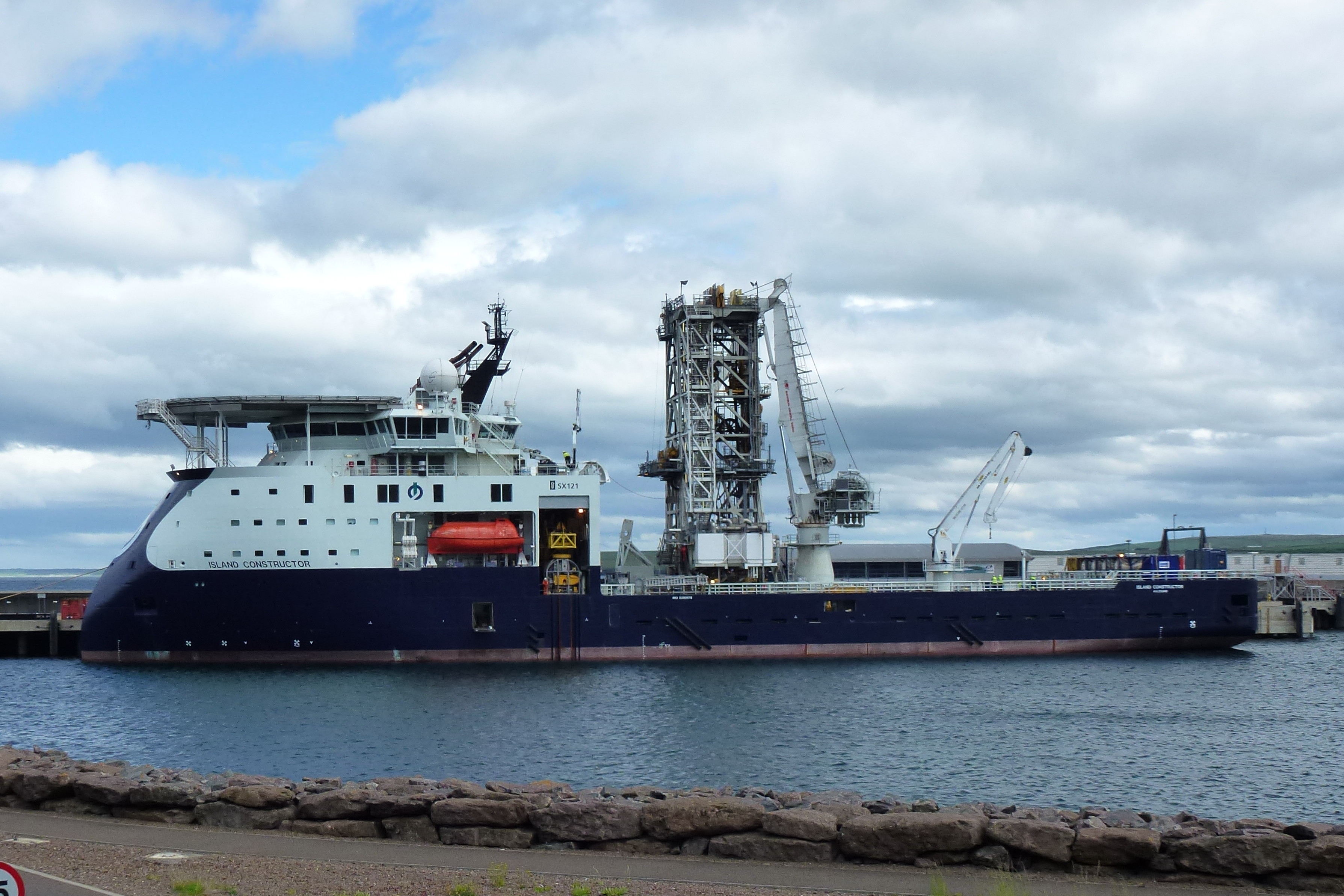 Island Constructor offshore installation vessel